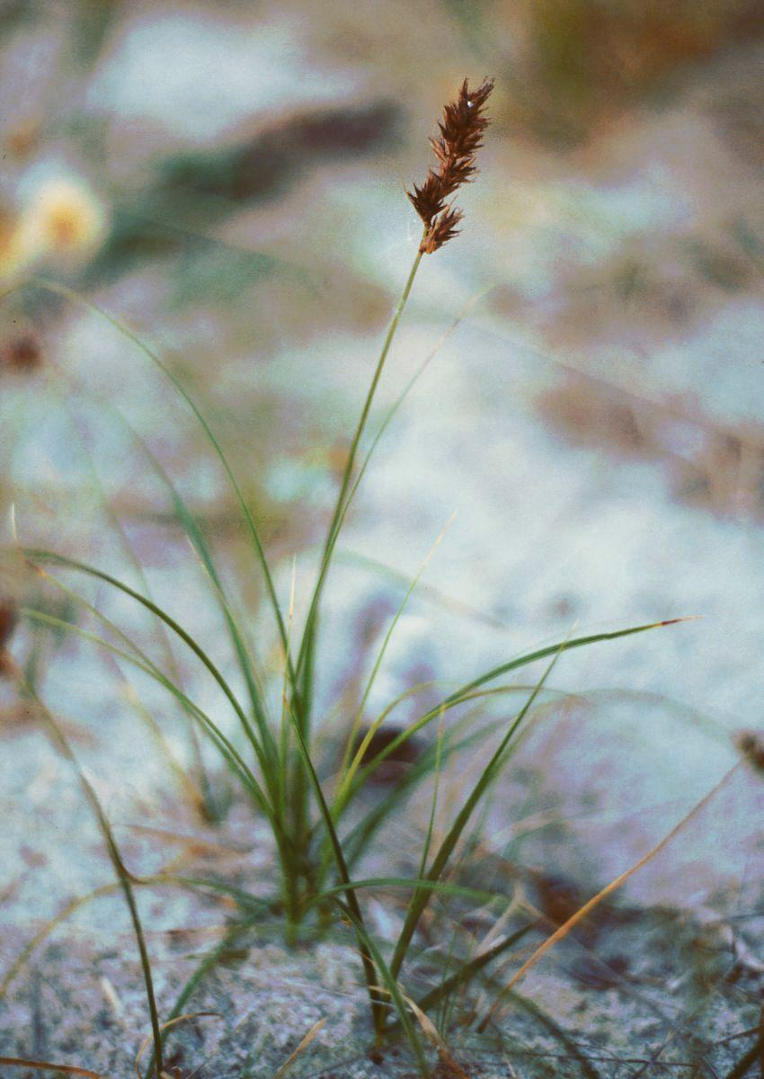 Sand-Segge (Carex arenaria), Sauergräser (Cyperaceae) – Litauen/Lietuva/Lithuania: Kurische Nehrung/Kuršių nerija, N Nida